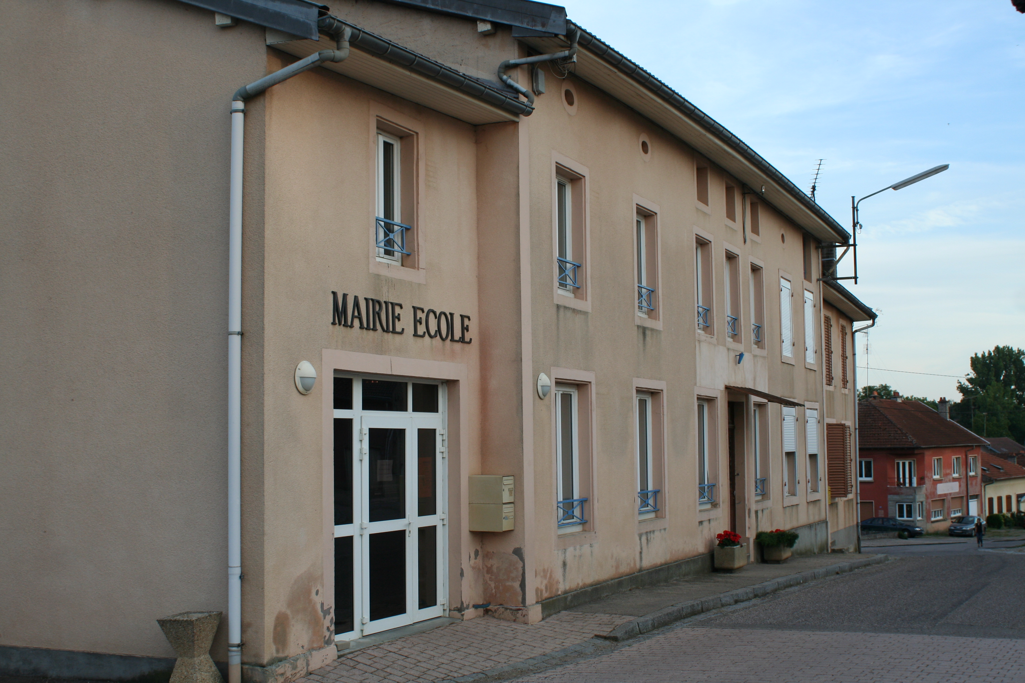 Mairie de Rehaincourt (Vosges)